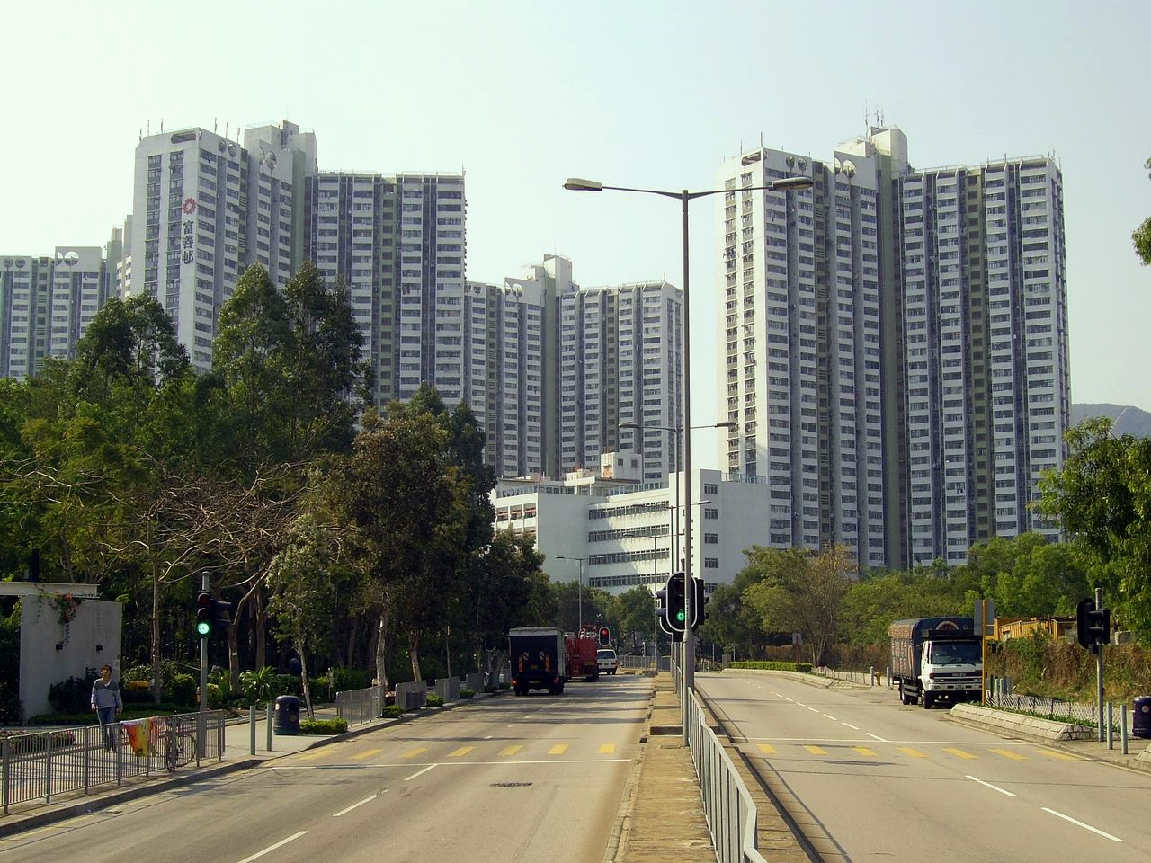 富善邨